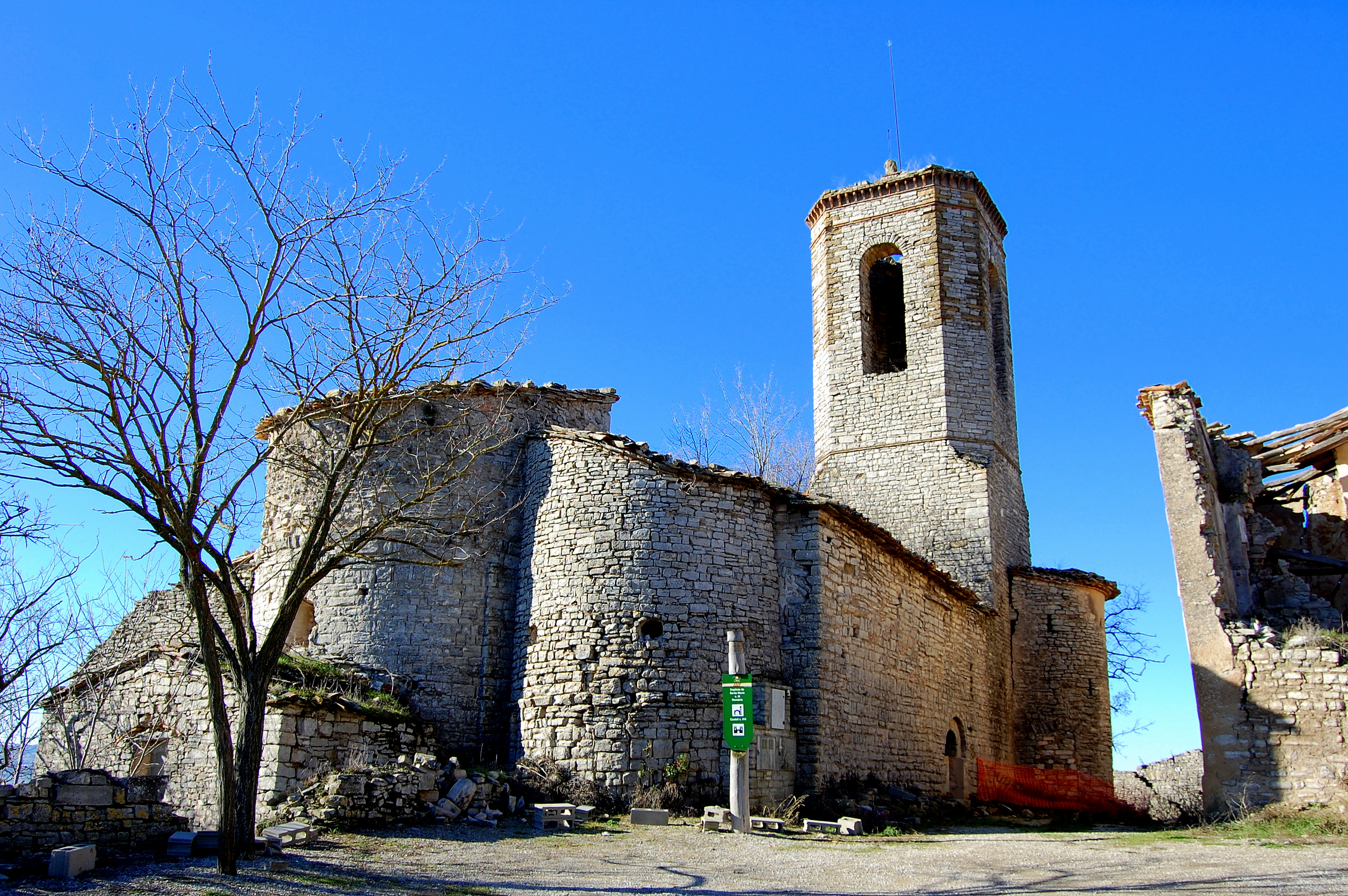 Església parroquial de Santa Maria de Montlleó (Ribera d'Ondara)